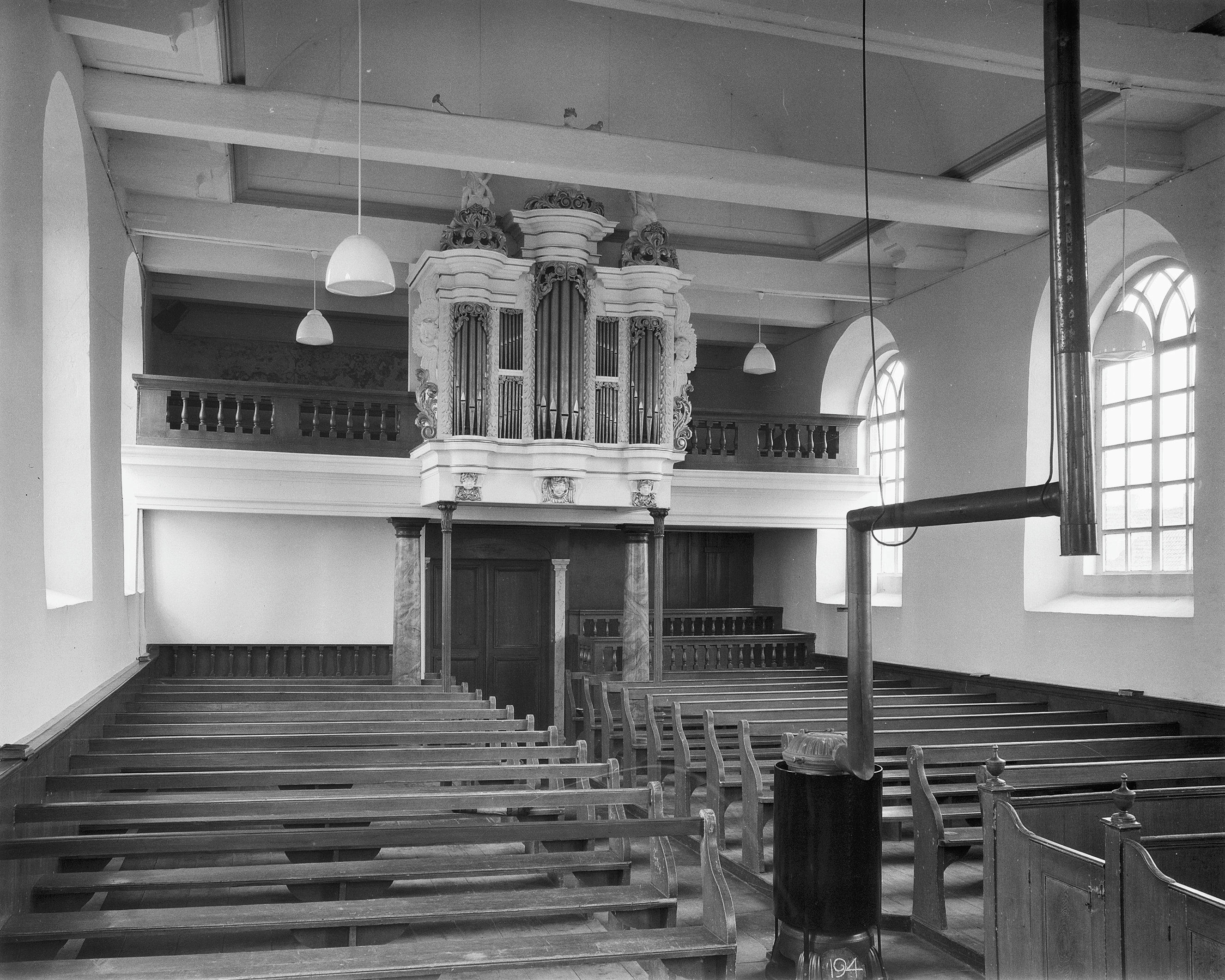 N.H.Kerk: interieur naar het westen